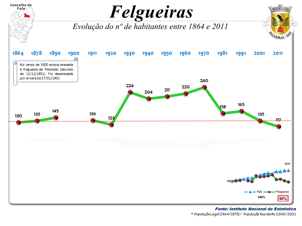 Censos 1864/2011